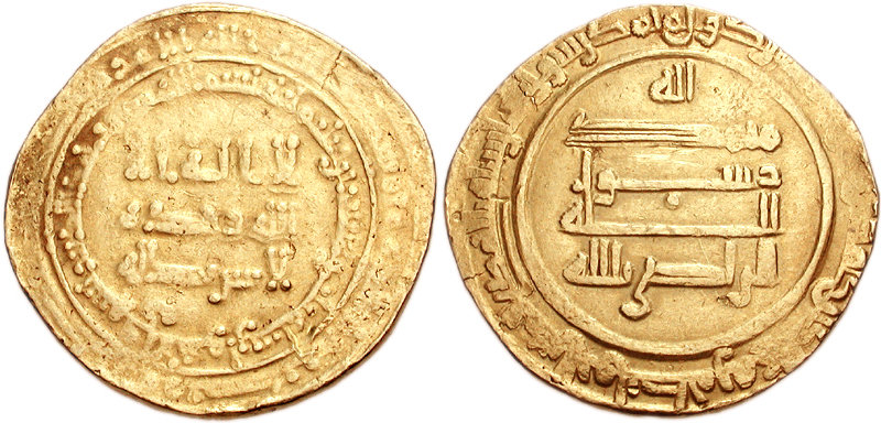 Dinar de ouro do califa abássida al-Radi